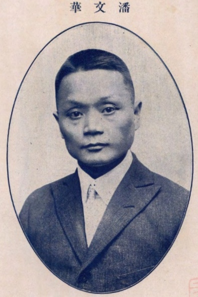 中文（中国大陆）: 重慶市私立孤兒院董事肖像